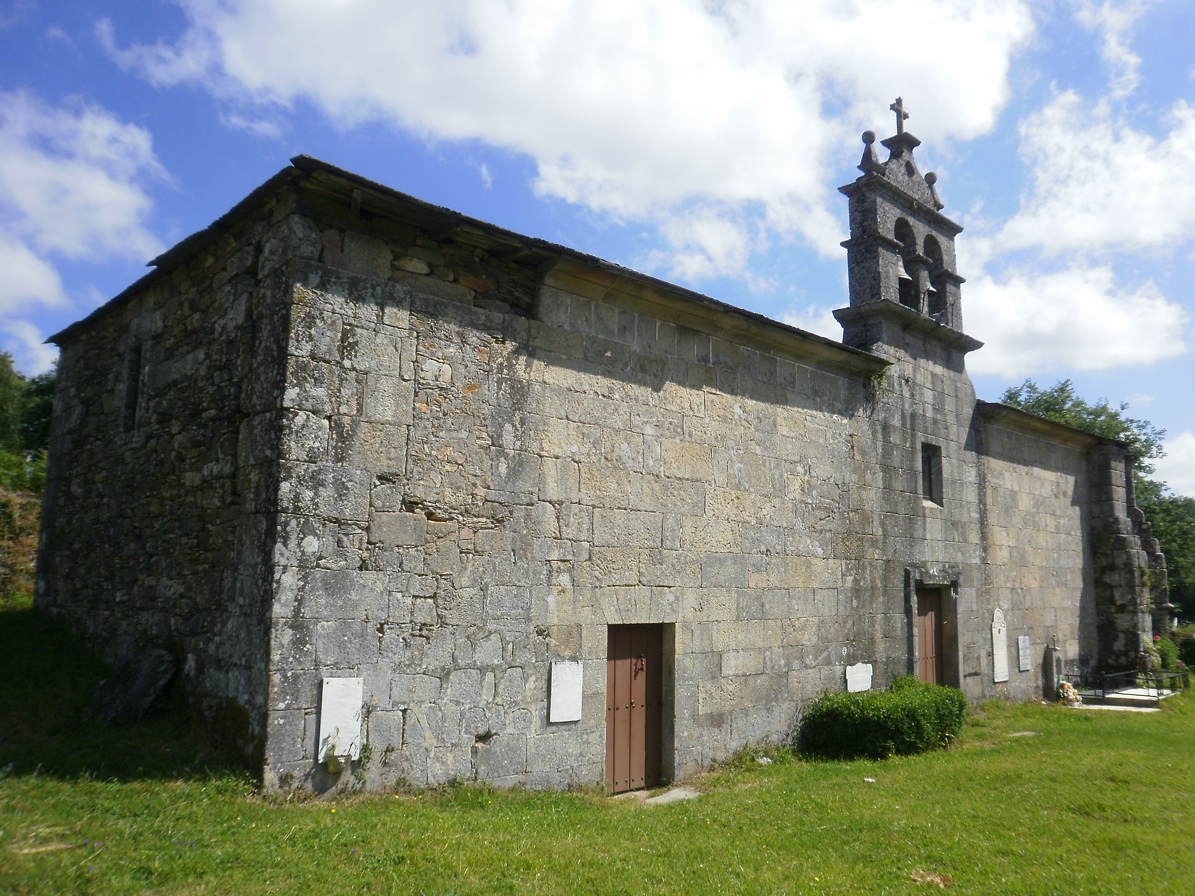 Igrexa de Santa María de Castro de Rei de Lemos, Paradela